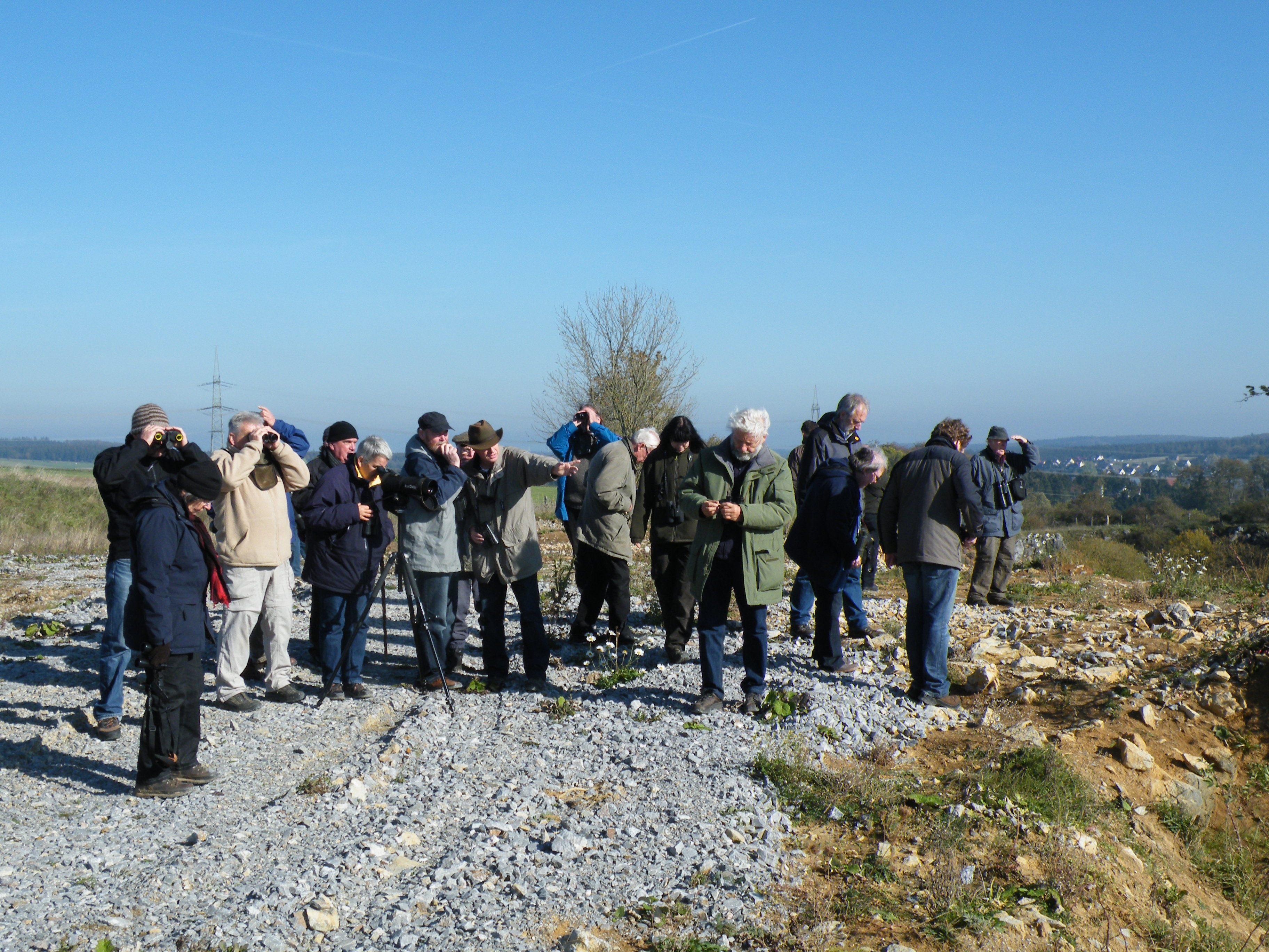 Teilnehmer einer Exkursion während der Jahrestagung der AG Eulen in Marsberg-Bredelar in einem Steinbruch der Rheinkalk AG Brilon-Rösenbeck.